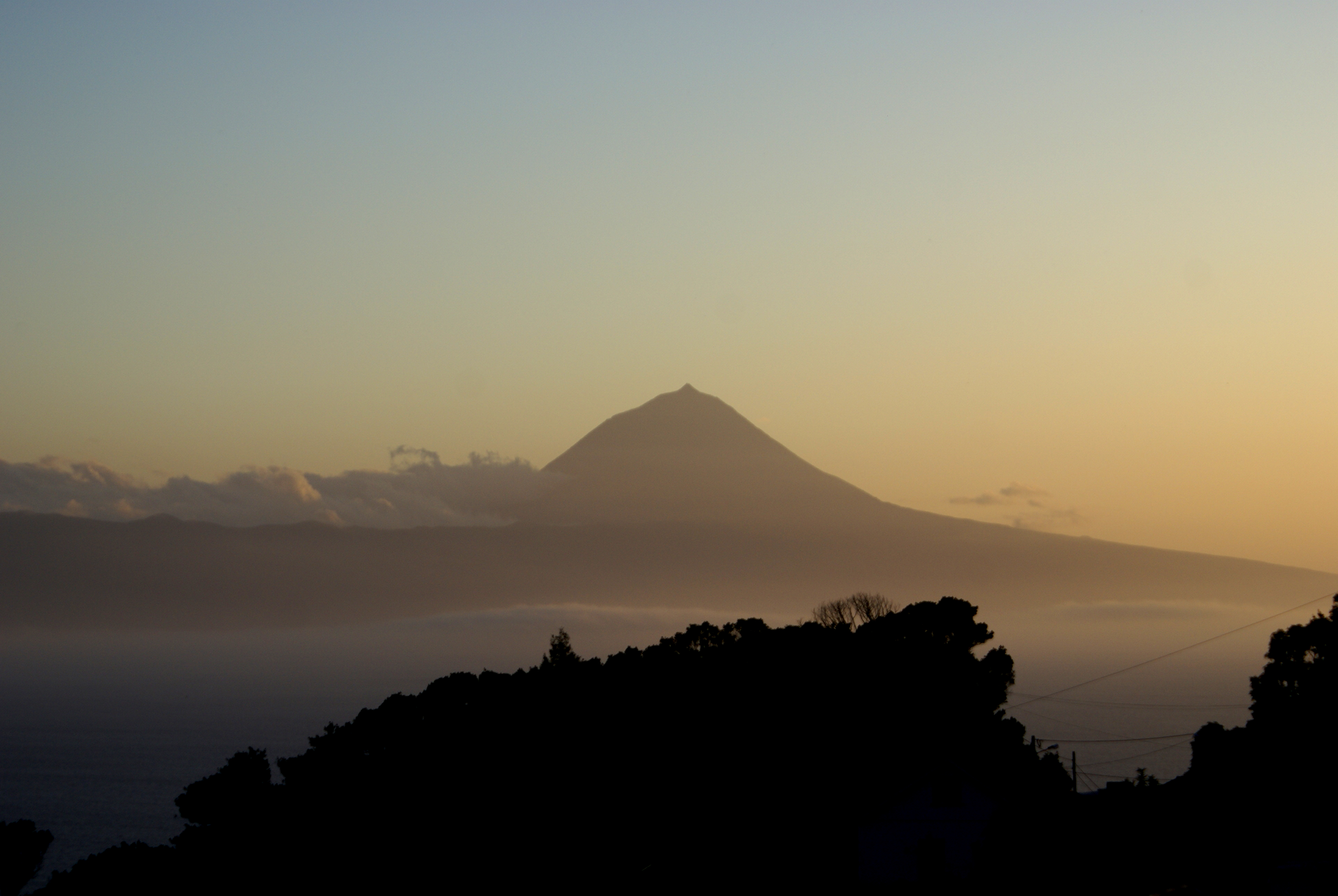 Montanha do Pico vista ao por do sol da Ribeira do Nabo, Velas, São Jorge, Açores